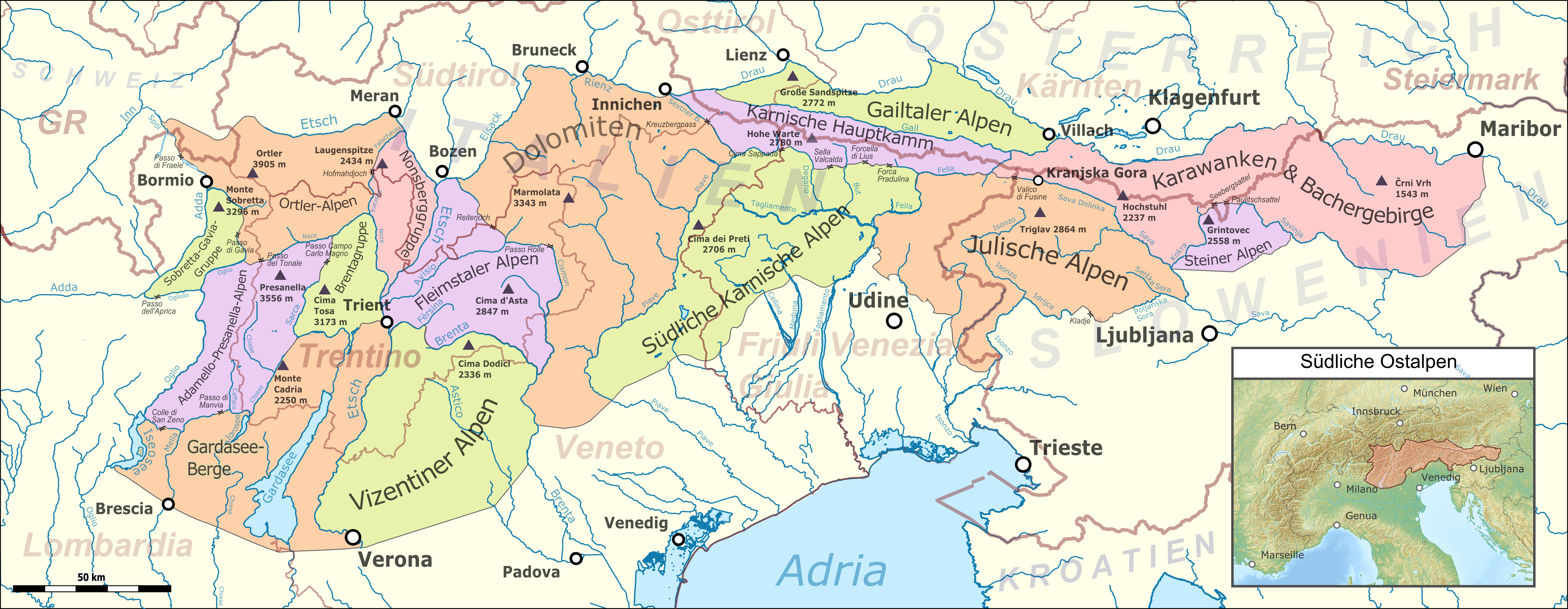 Lagekarte der südlichen Ostalpen